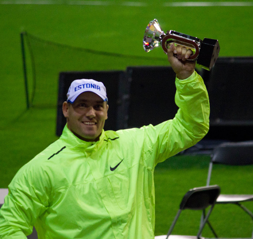 Gerd Kanter during 2012 Memorial Van Damme, Brussels